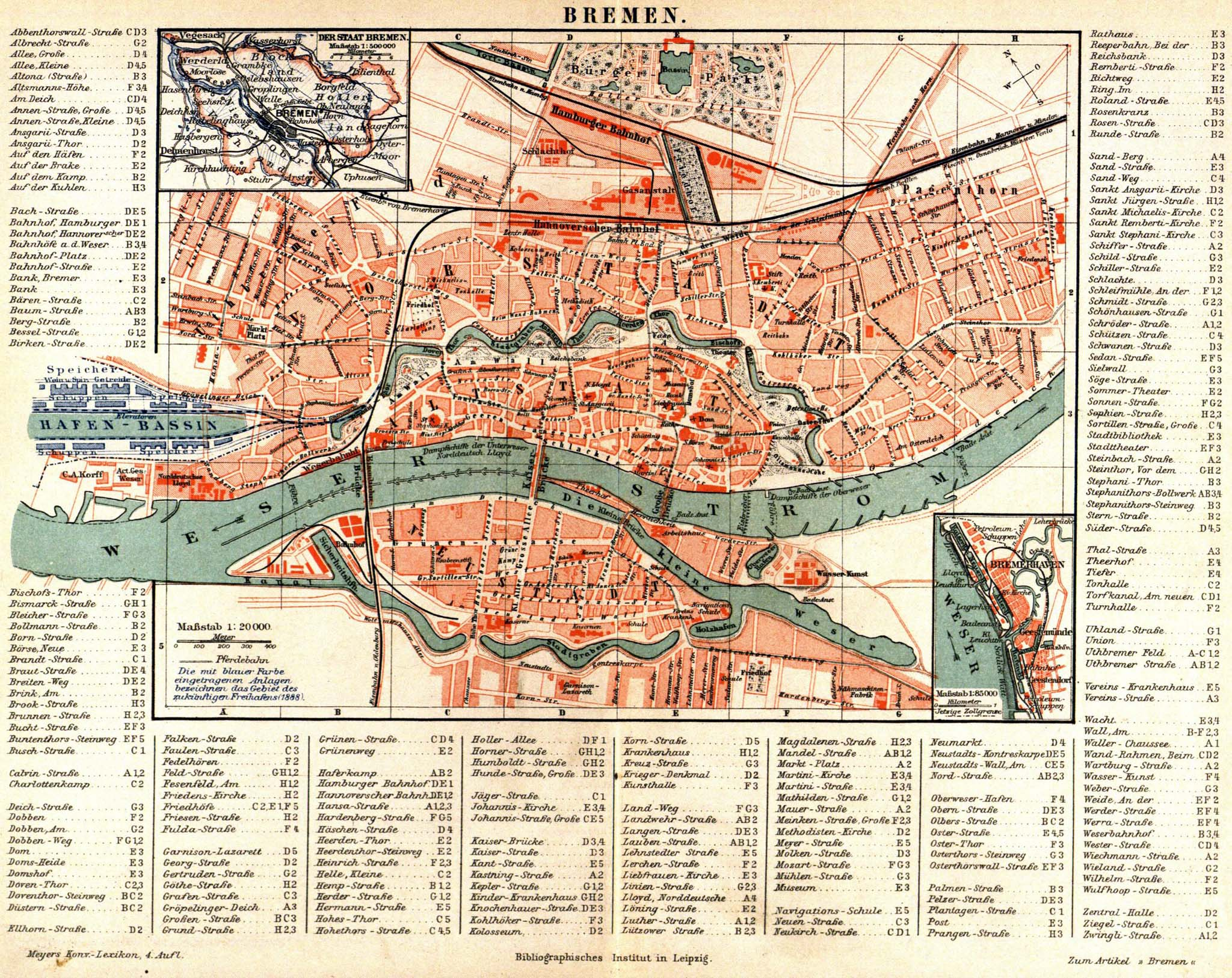 Bremen (1 : 20.000); Bremerhaven (1 : 85.000)